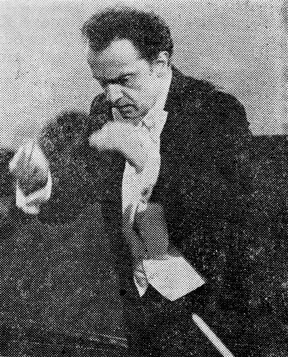 Antoni Wit - polski dyrygent. Aula UAM, Poznań. 1986r.